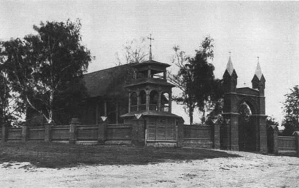 Беларуская (тарашкевіца): Каралішчавічы (Karališčavičy). Касьцёл Апекі Маці Божай